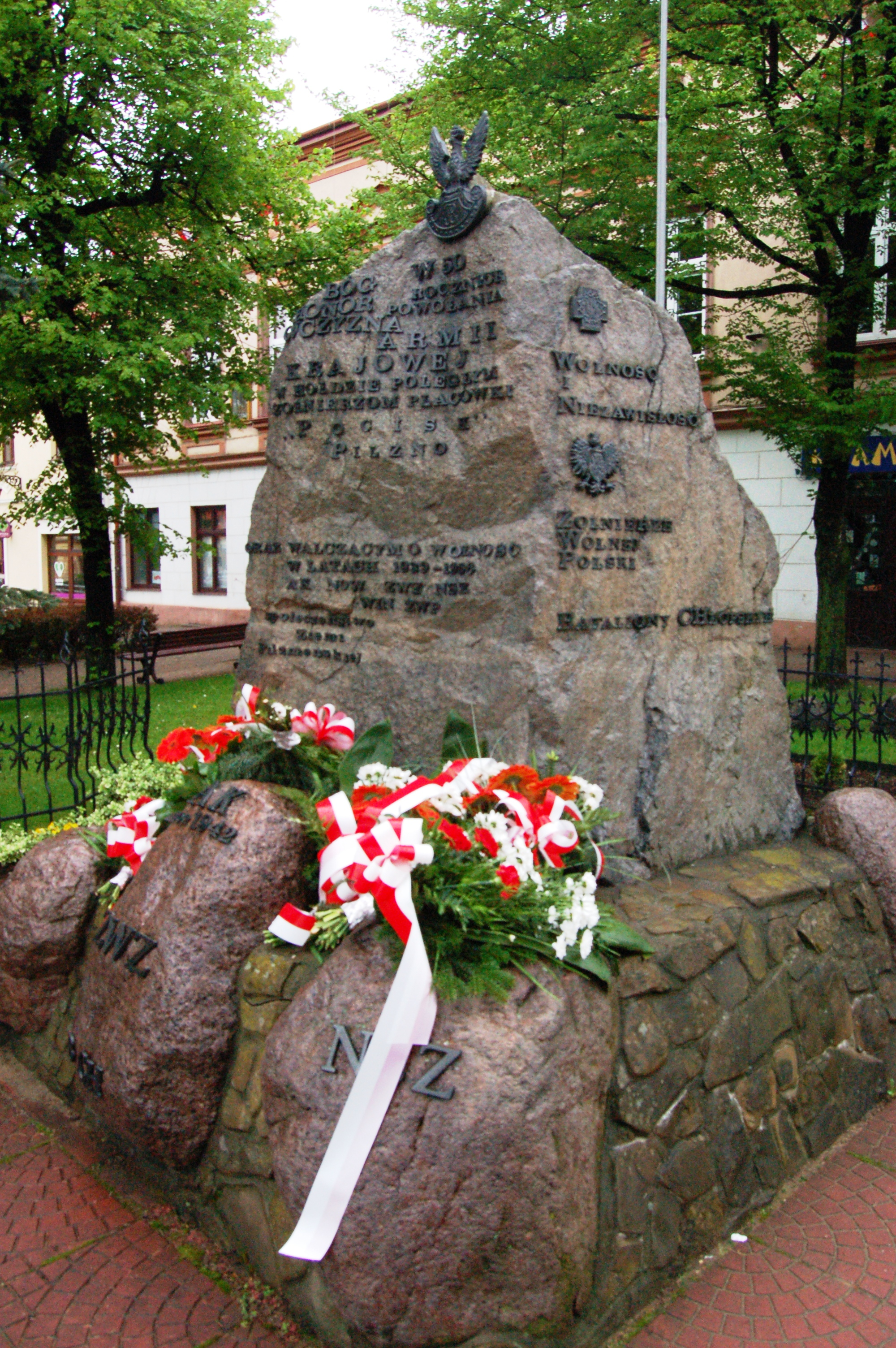 Denkmal in Pilzno, Polen